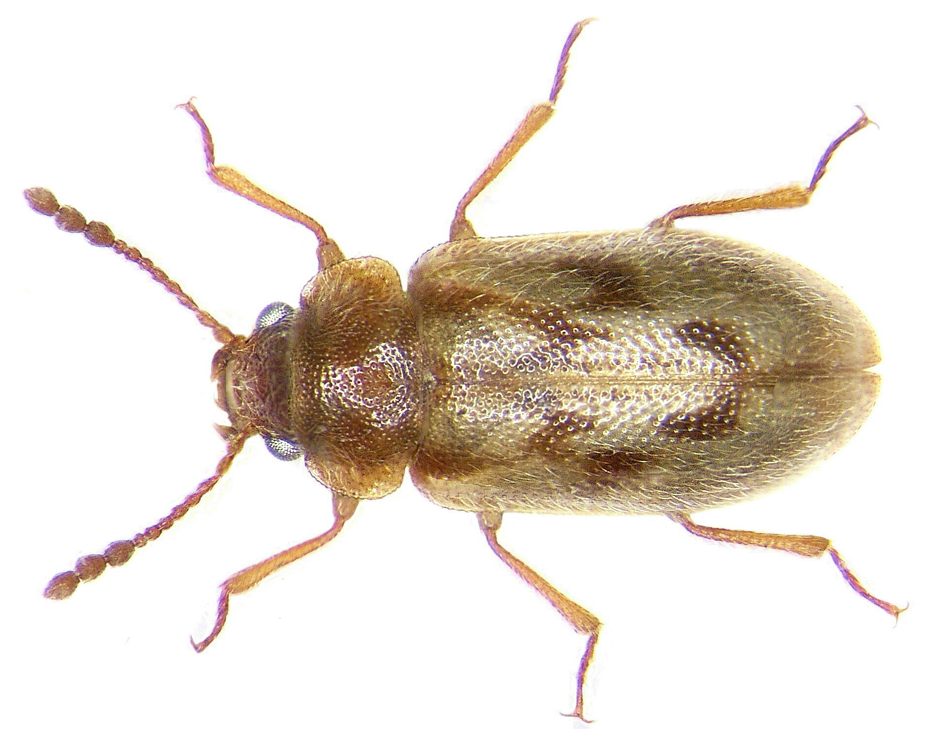 Familie: Phloiophilidae Grösse: 2,5-3,3 mm Verbreitung: Europa Ökologie: Entwicklung in dürrem Laub- und Nadelholz, sehr selten Fundort: Germania, Thüringen, Berka leg.det. A.Weigel, 1998 Foto: U.Schmidt, 2007